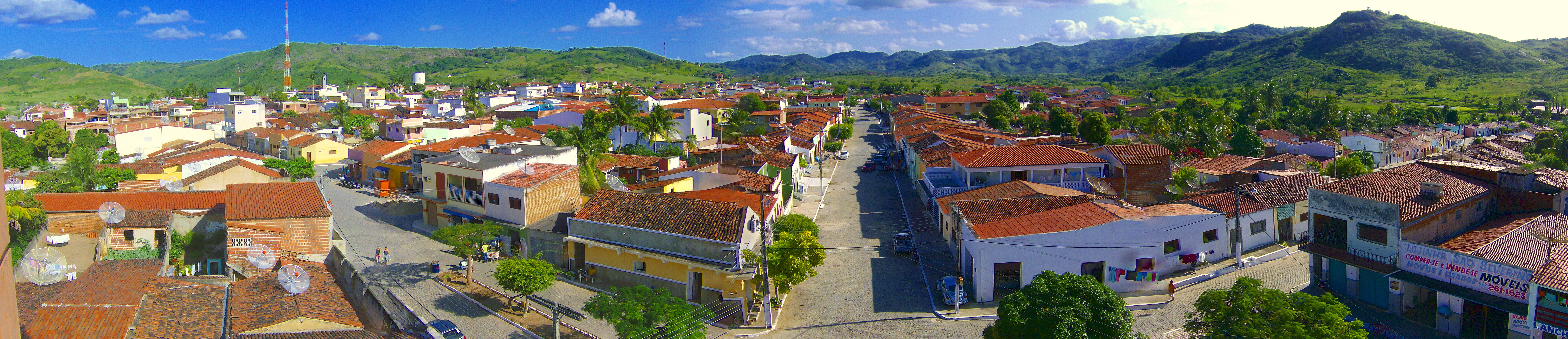 Vista das primeiras ruas de Belém, estado da Paraíba.